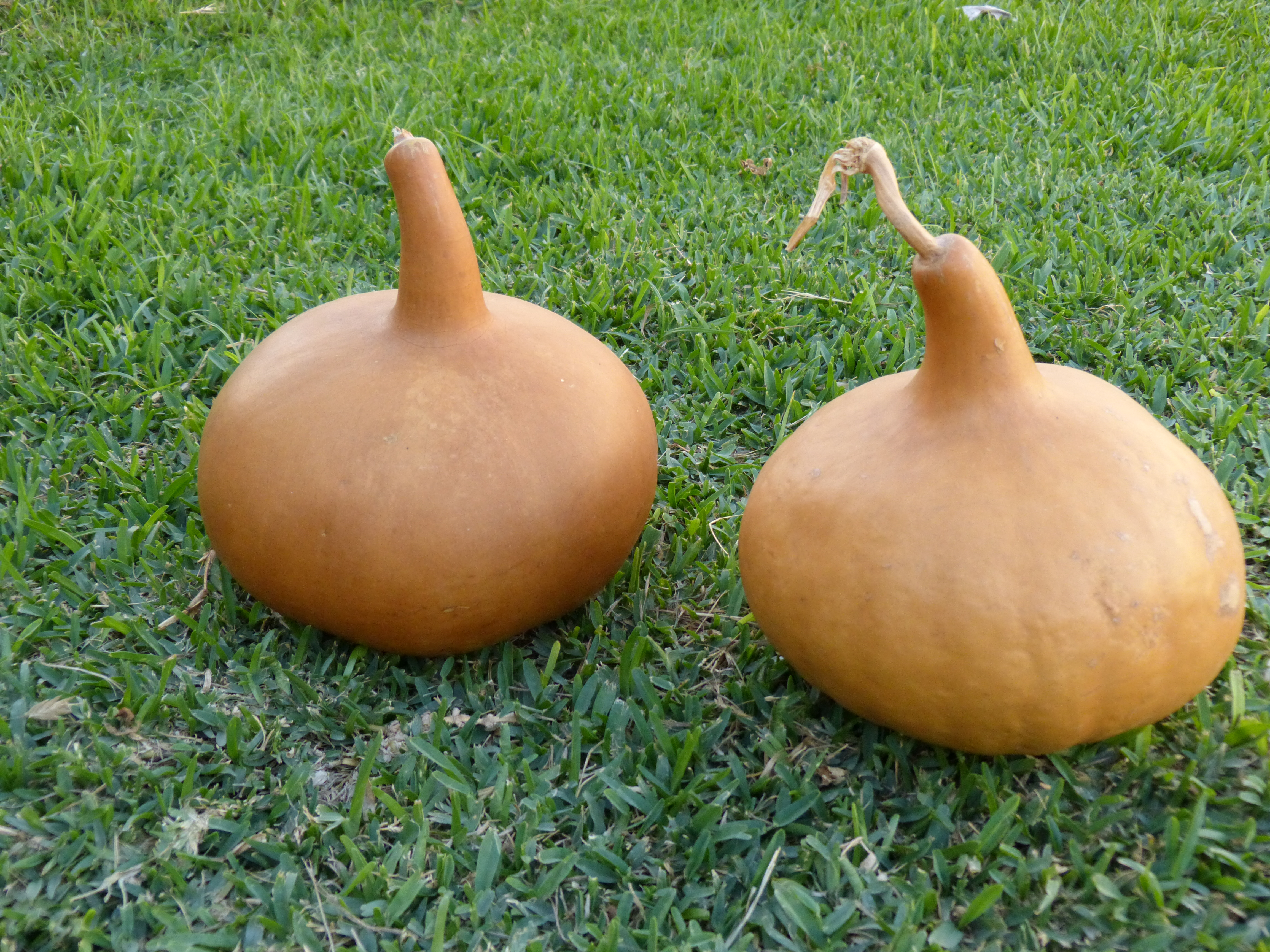 Lagenaria siceraria, de 20 cm diámetro x 20 cm de alto